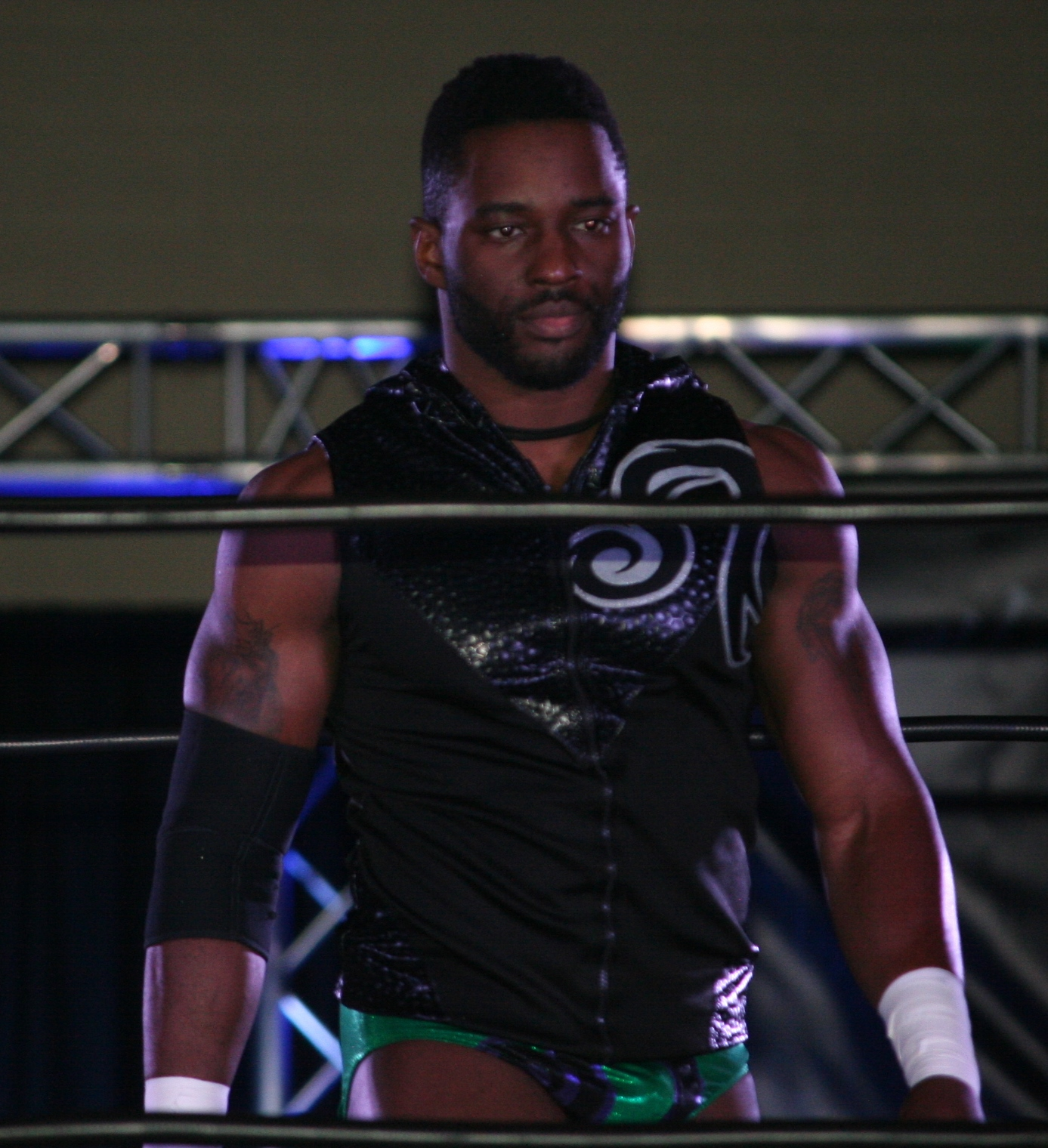 Cedric Alexander en 2016.